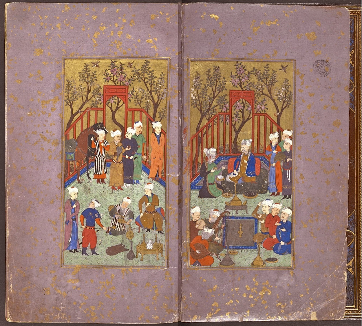 Müəllif: Şərəfəddin Hüseyn Sultani Hazırlanma ili: 1468 Britaniya Milli Kitabxanası invertar nömrəsi: 16561, folio 1v-2r